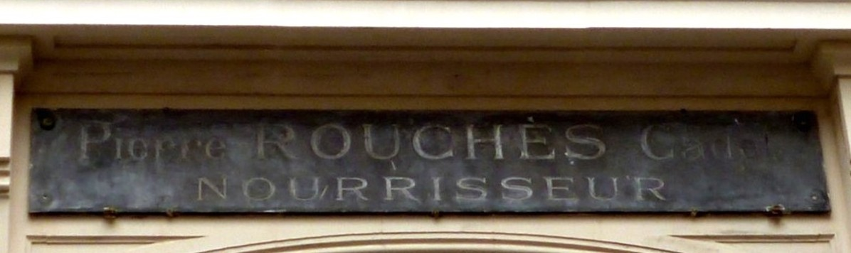 Enseigne de nourisseur, située dans Paris (75011) encore visible sur la façade du 1, impasse Franchemont.